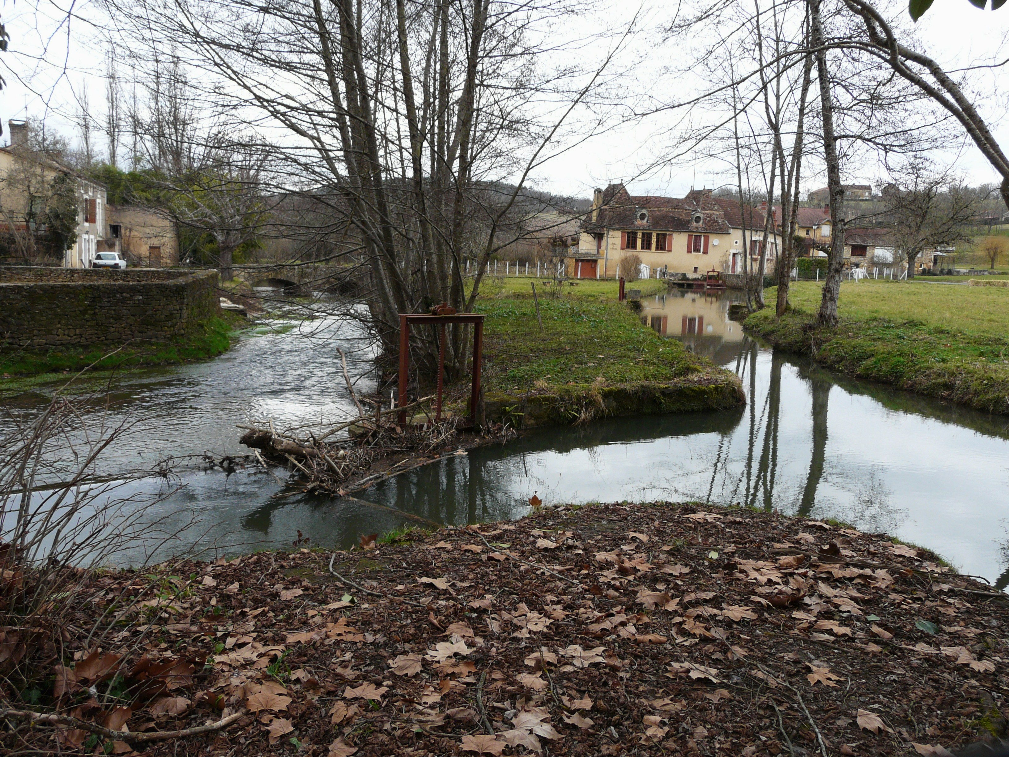 La Nauze à Sagelat, Dordogne, France.